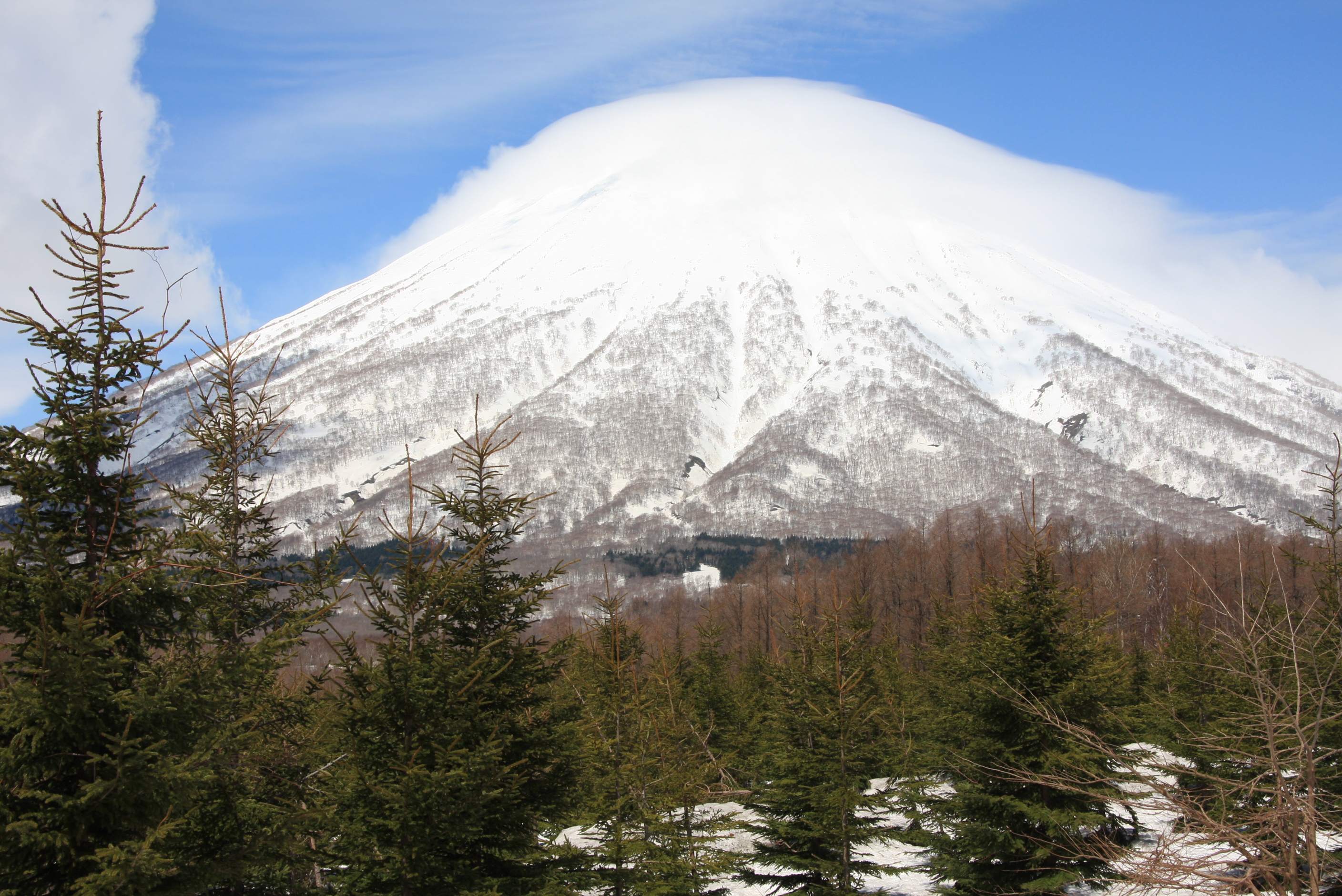 羊蹄山と傘雲 京極町